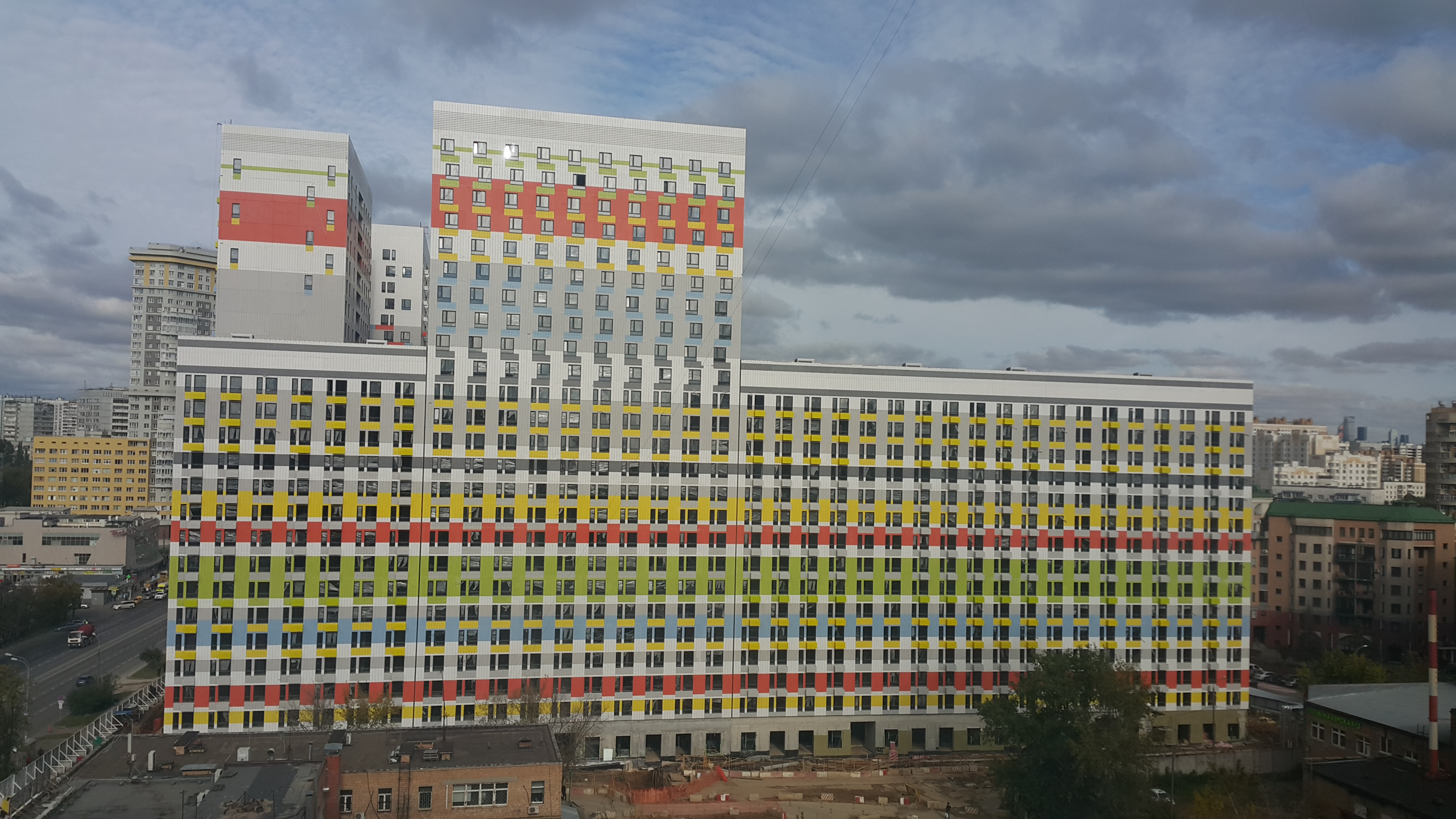 Жилой дом типа ПИК-1